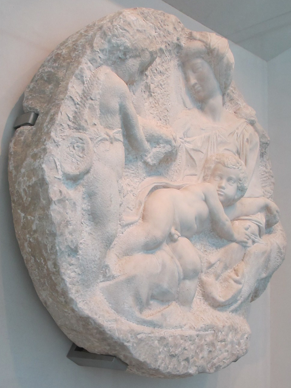 Michelangelo, tondo taddei, 1504-05 ca.